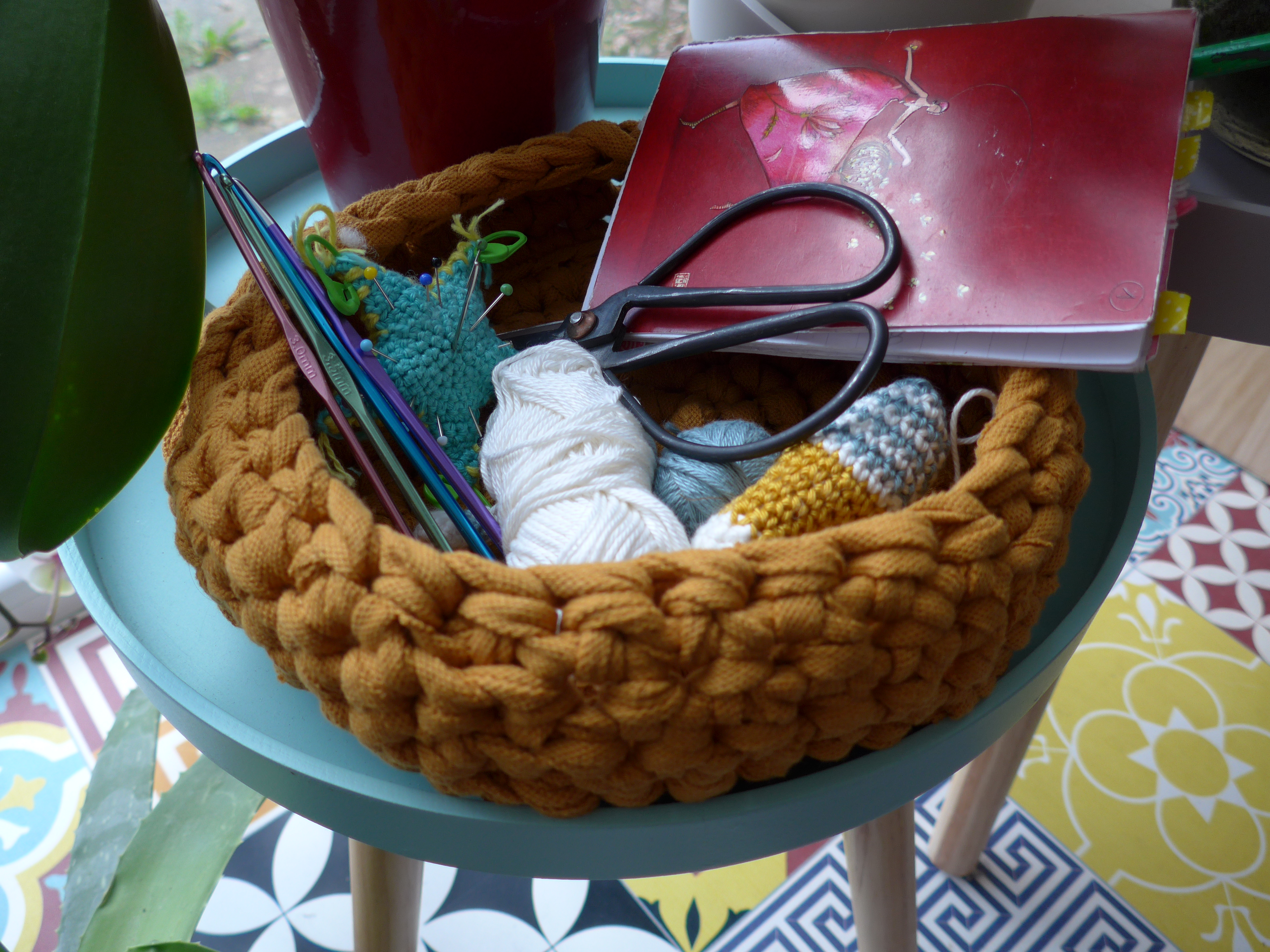 Corbeille réalisée en ribbon